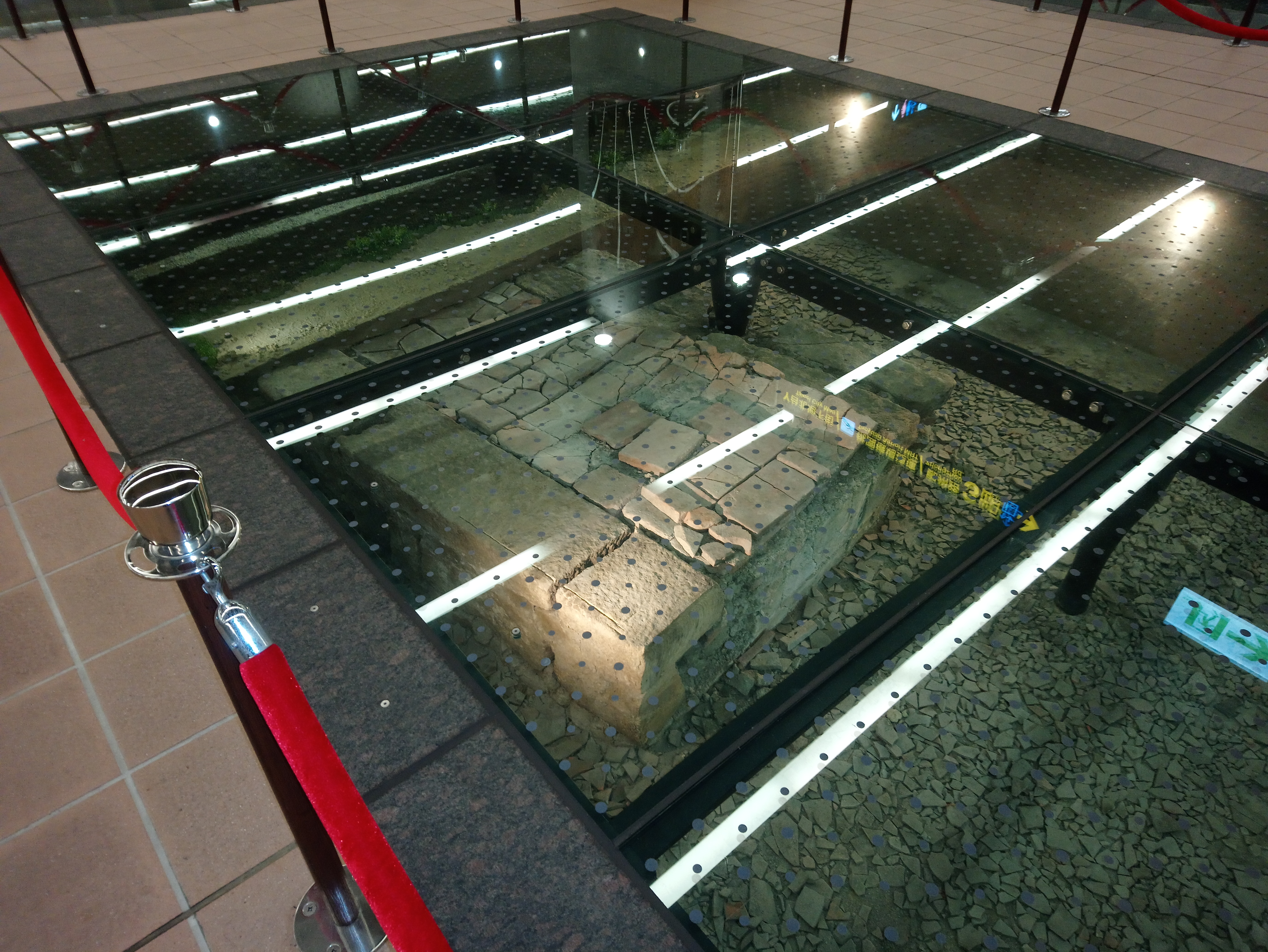 清代機器局門道遺構,臺北市大同區延平次分區玉泉里